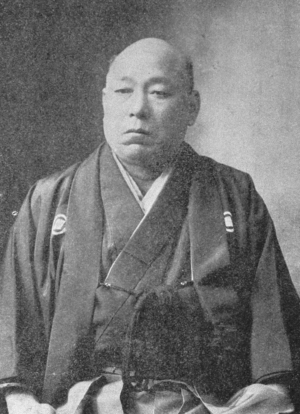 Portrait of Amemiya Keijiro (雨宮敬次郎, 1846 – 1911)